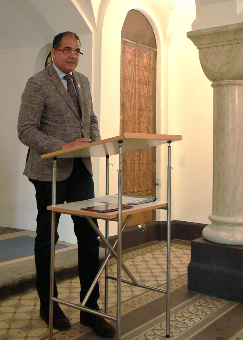 Igor Cesar, Botschafter von Ruanda in Deutschland im Nds. Landesamt Denkmalpflege